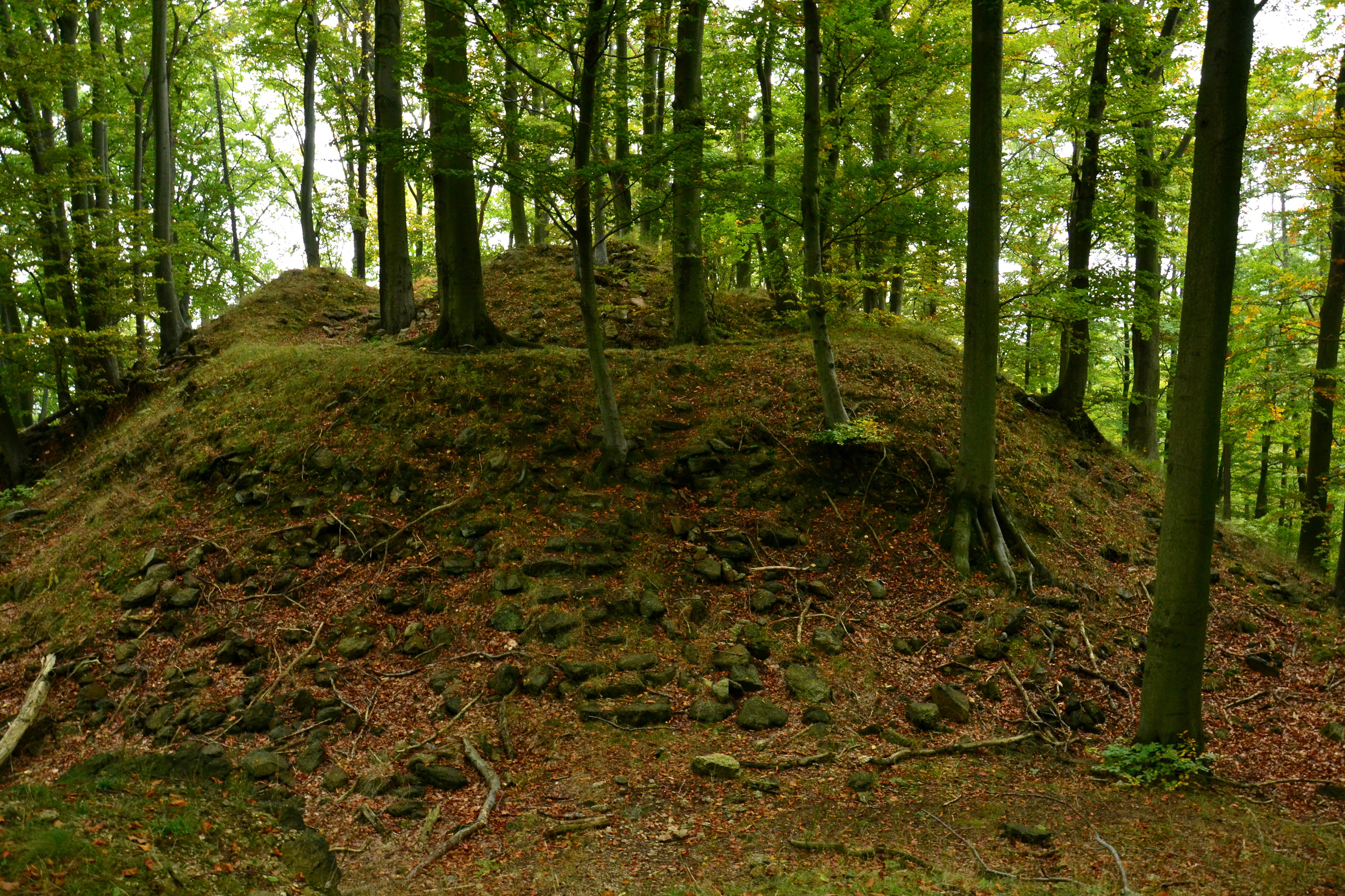 Hrad u Albrechtic - hradní jádro